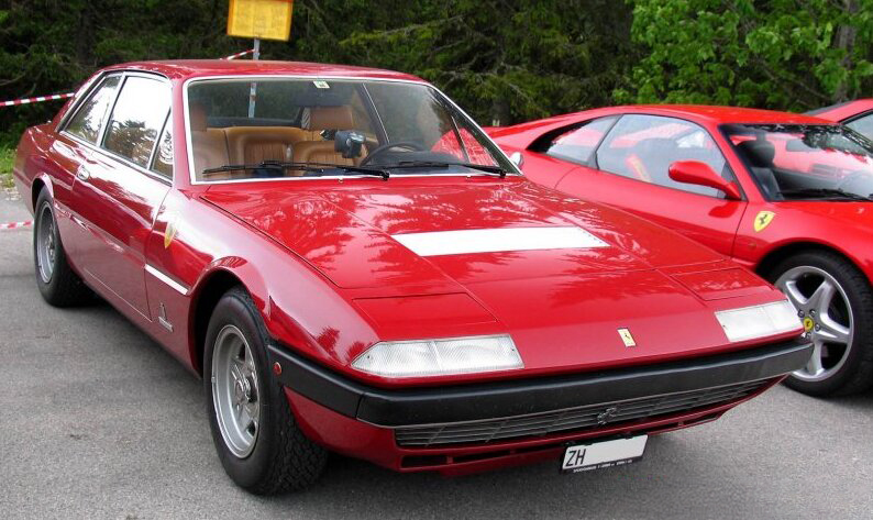 Ferrari 365 GT4 2+2 Bild wird freundlicherweise von zur Verfügung gestellt. Autor: Matteo "TT" Stucchi Genehmigung: per E-Mail vom 9.2.2006 mit Billigung der "creative commons"-Lizenz